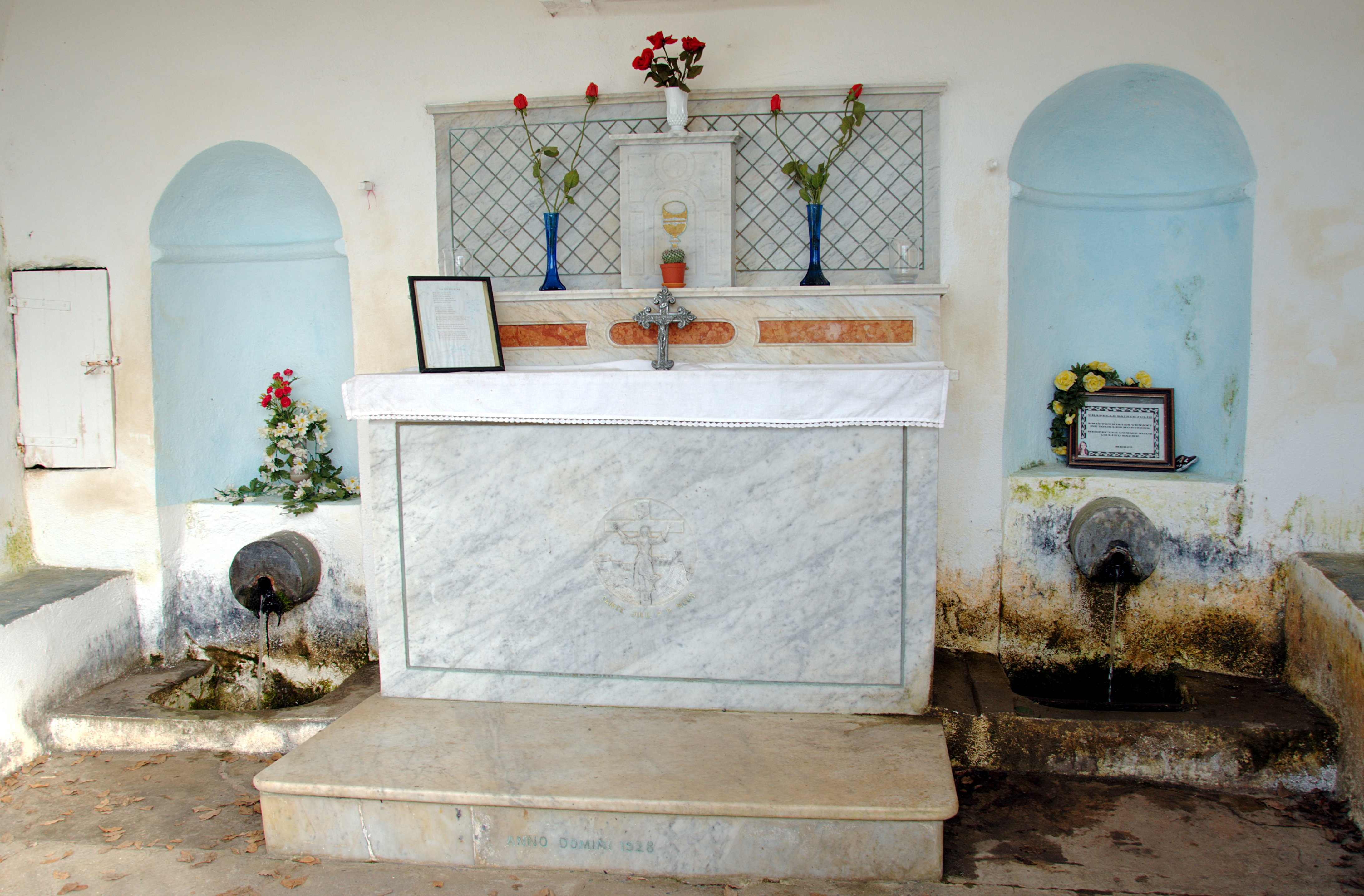 Источник святой Иулии